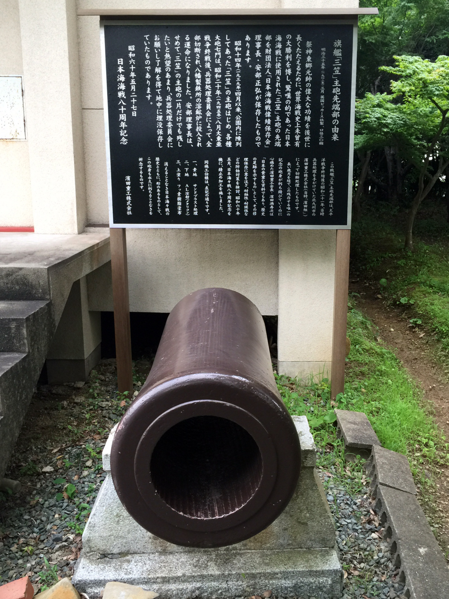 私が現地へ訪問、撮影。